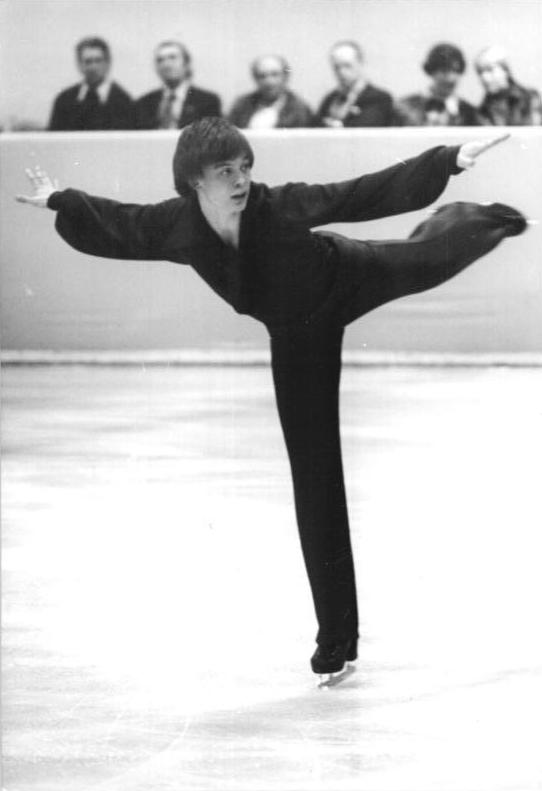 Konstantin Kokora ADN-ZB Reiche 19.11.76 Berlin: Konstantin Kokora führt bei den Herren. Der sowjetische Nachwuchsläufer Konstantin Kokora liegt nach Pflicht und Kurzprogramm im Pokal der Blauen Schwerter weiterhin in Führung. Sein Programm am Abend des 18.11.76 in der Berliner Werner-Seelenbinder-Halle strahlte viel Eleganz aus.